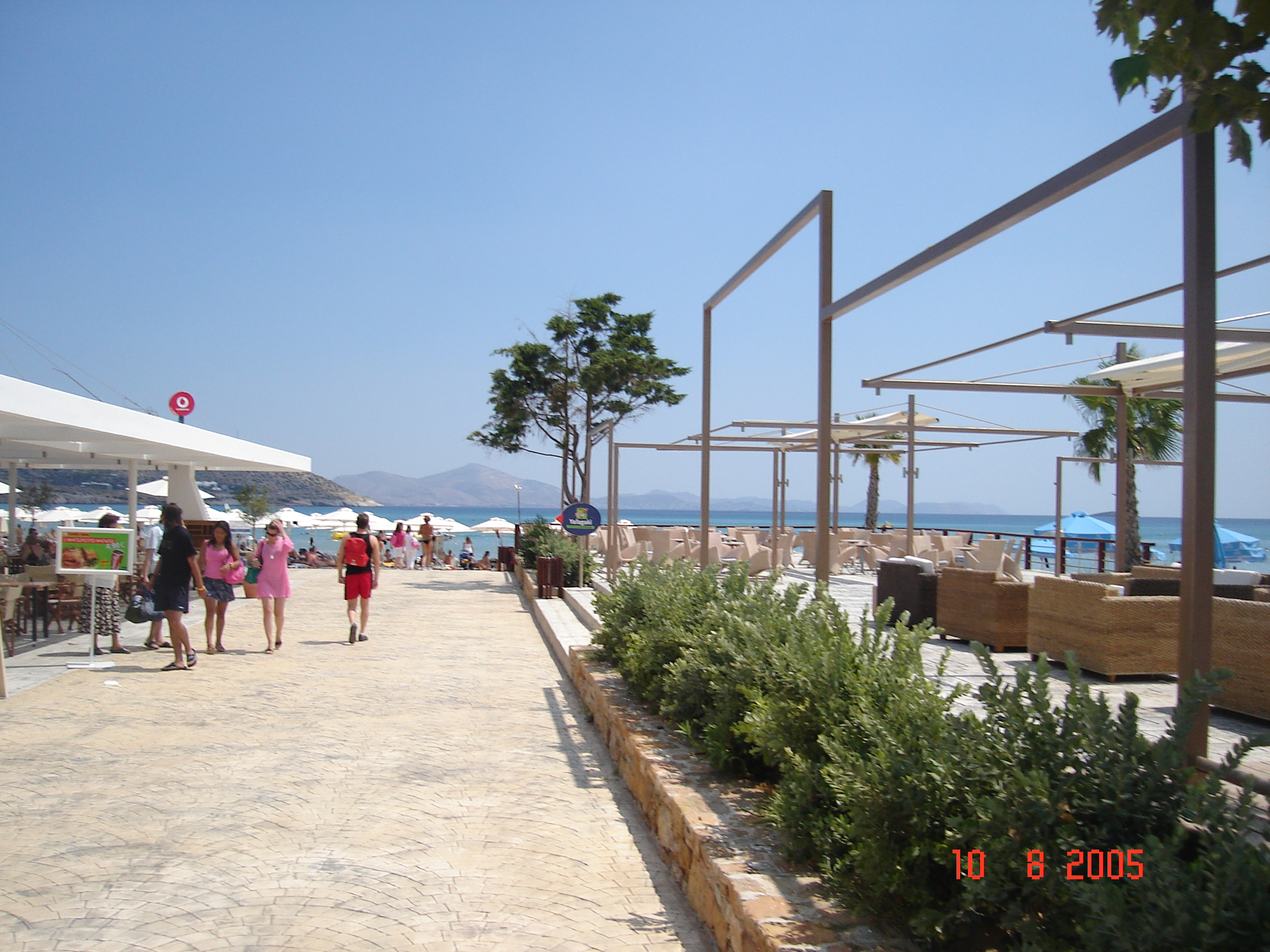 Varkiza Beach